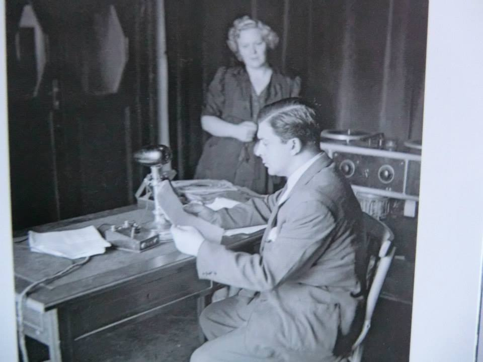 Rosa Di Napoli e Armando Scaturchio in uno studio di Radio Bari nel 1943